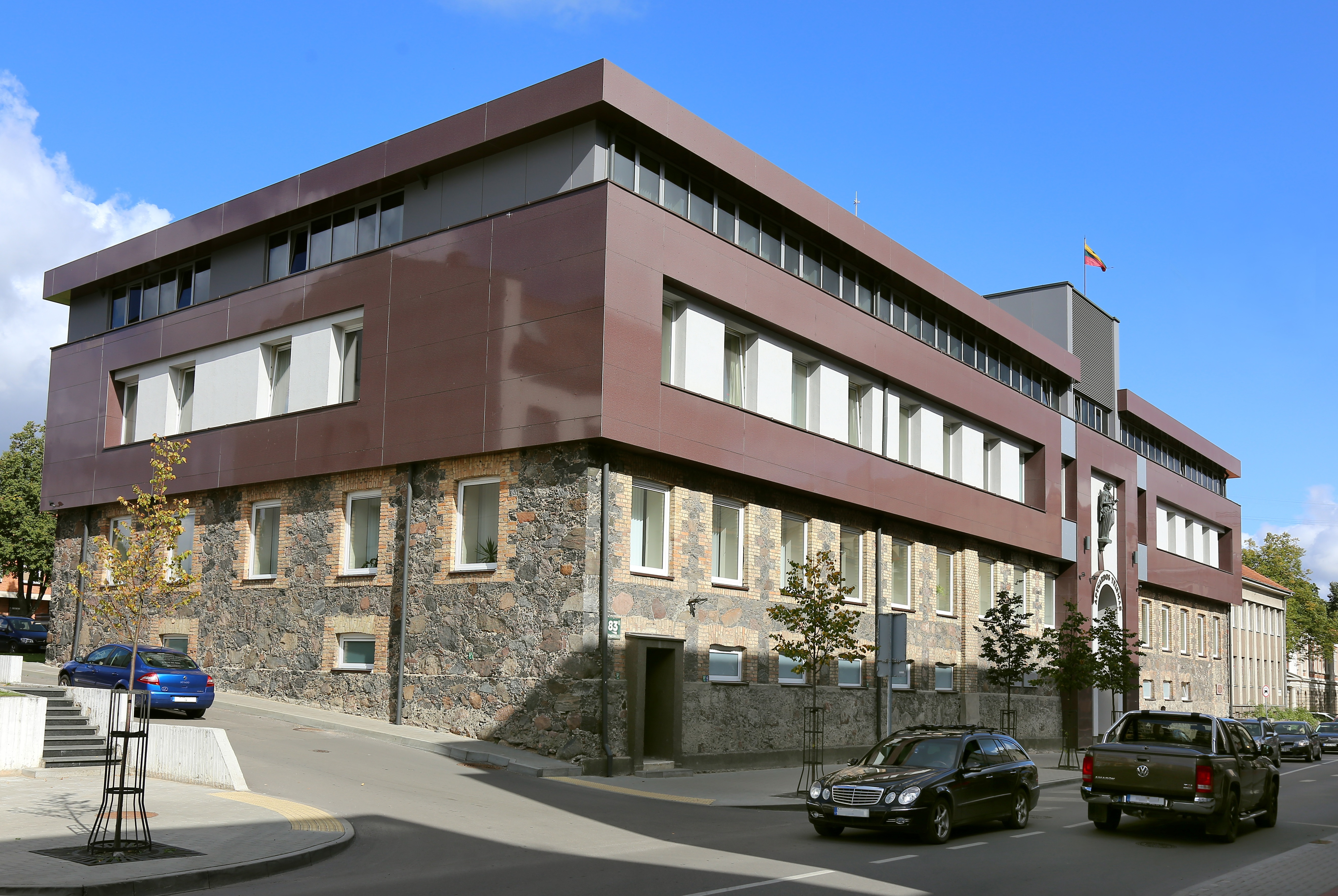 Šiaulių apygardos teismo pastatas (Dvaro g. 83)